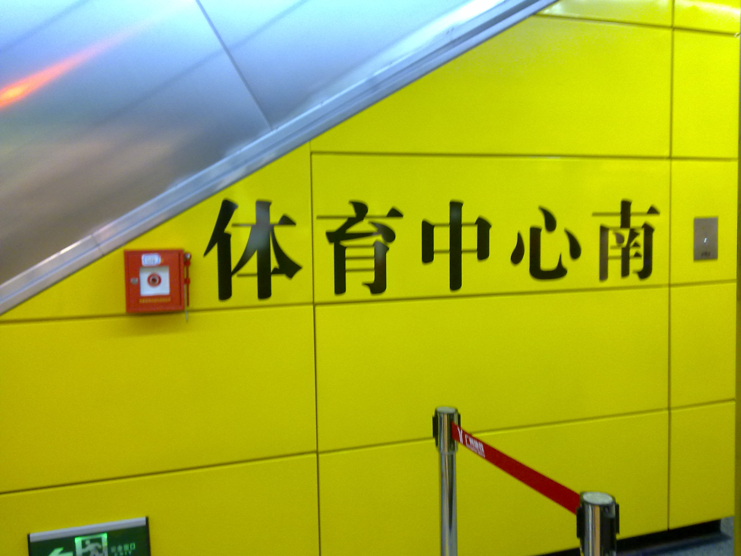 珠江新城旅客自動輸送系統體育中心南站